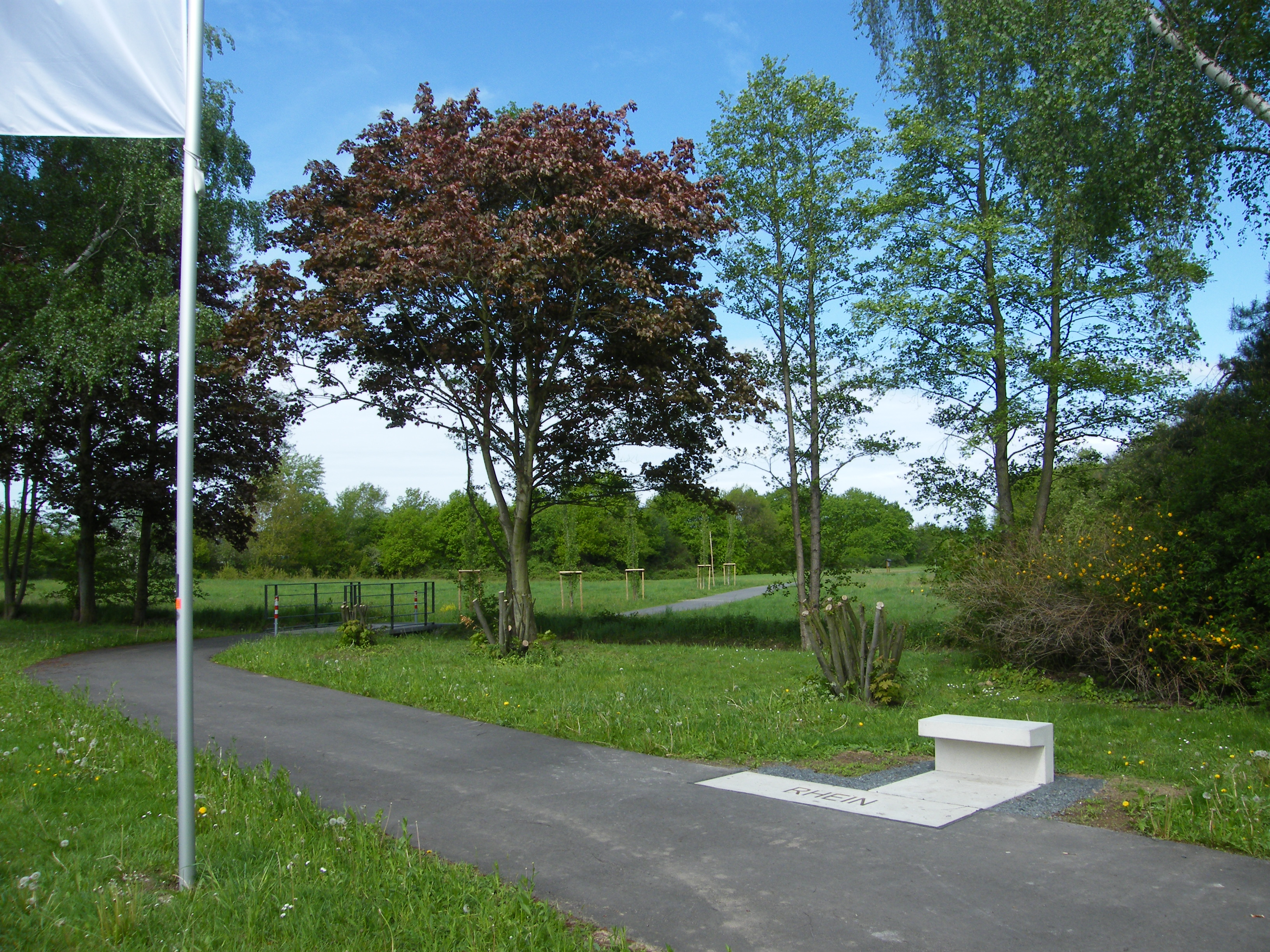 Beispiel eines Markierungselements am Link